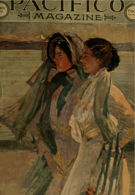 Portada de la primera revista Pacífico Magazine